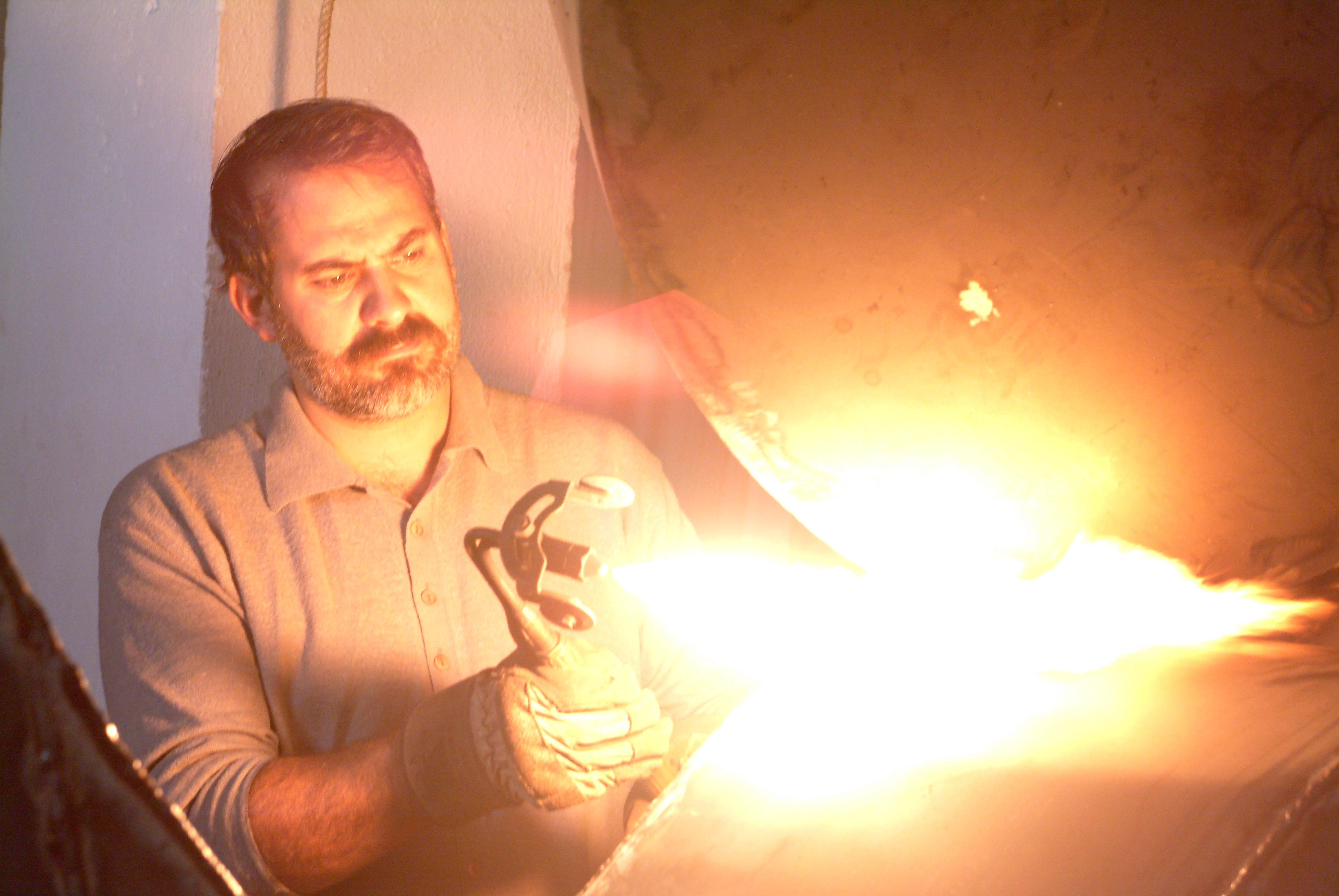 El Autor trabajando